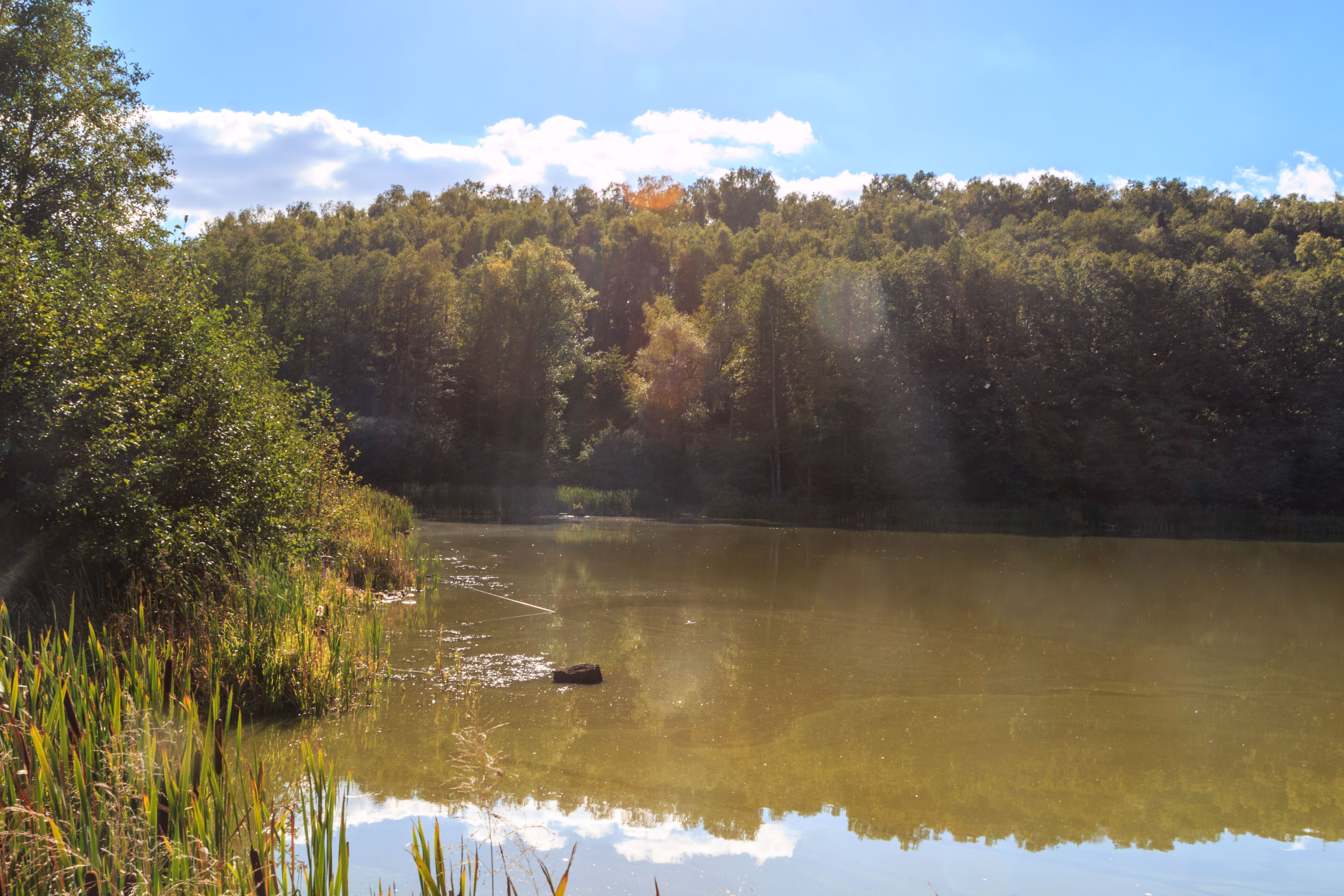 Bobří rybník u Pihelu Project: Vodstvo.